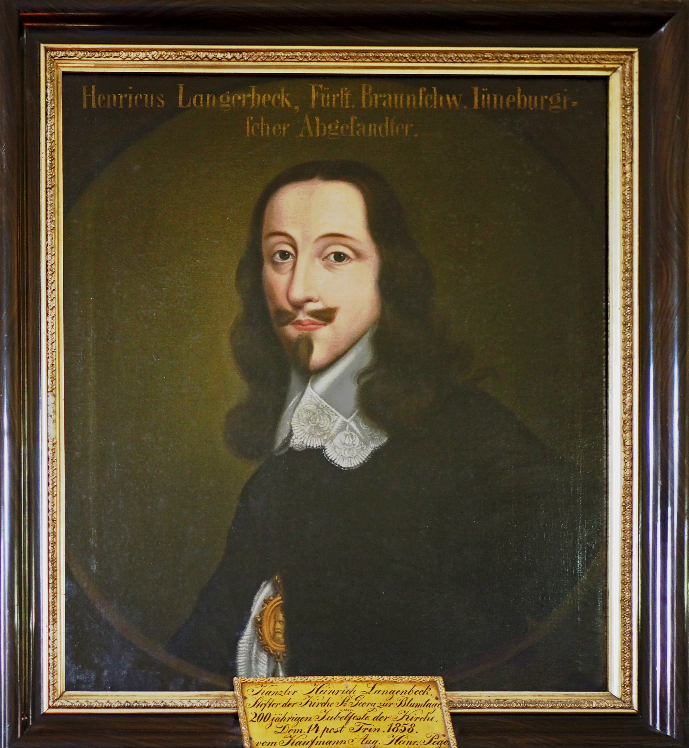 Porträt des Kanzlers Heinrich Langenbeck in der St. Georg-Kirche, Blumlage, Celle